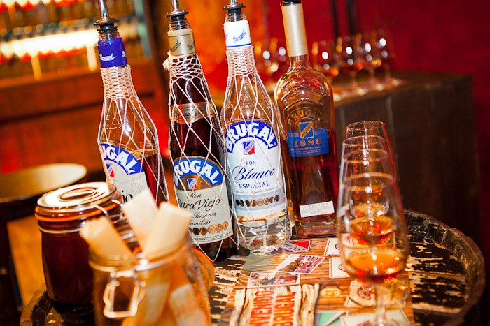 Variedades de Ron de la compañía Brugal & Co.